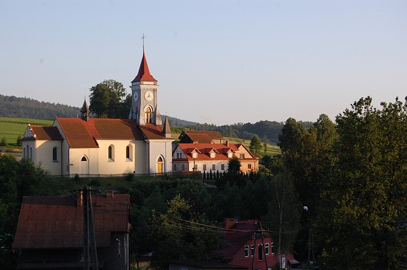 Widok na kościół św. Jana Kantego z pociągu